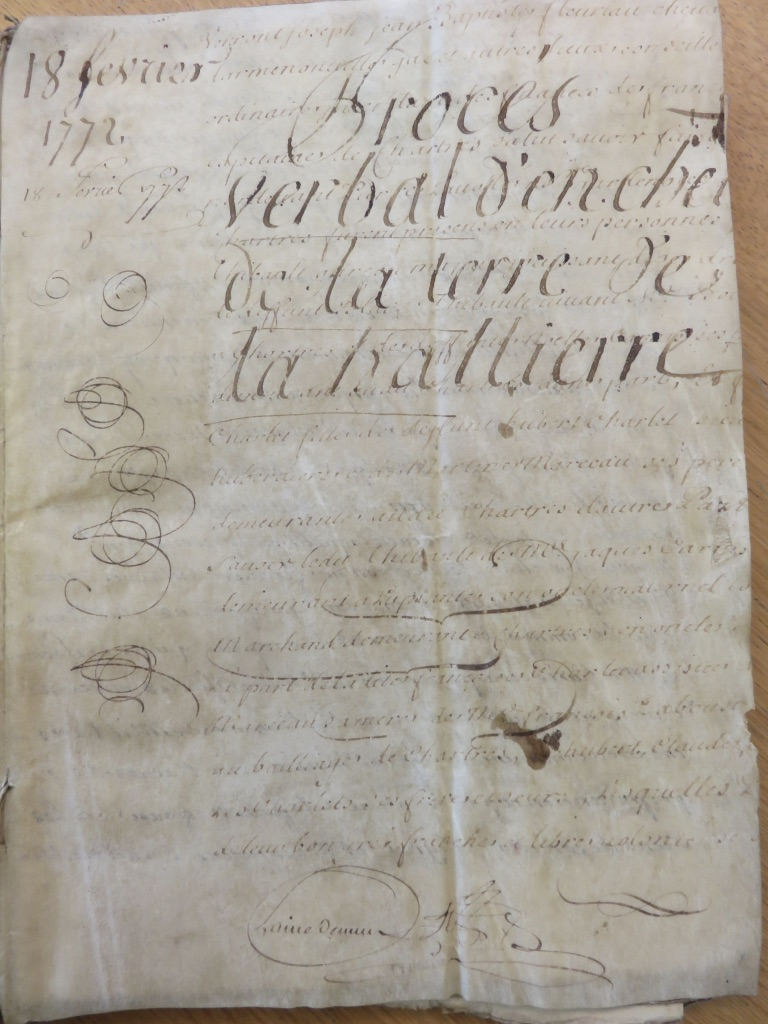 Acquisition de la Hallière par M. Armand Dupont, banquier à Paris, le 18 février 1772